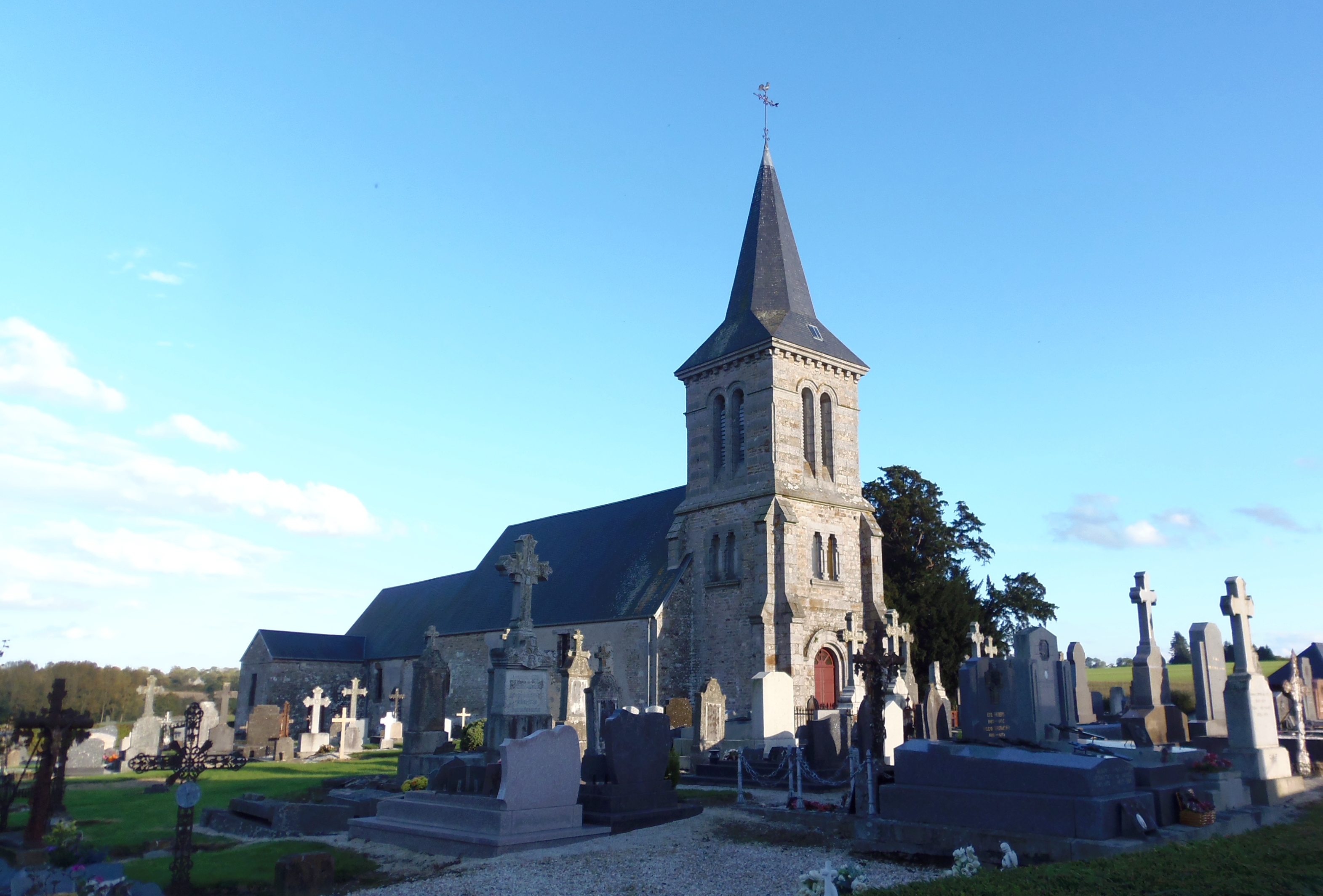 Pierres (Normandie, France). L'église Saint-Pierre.